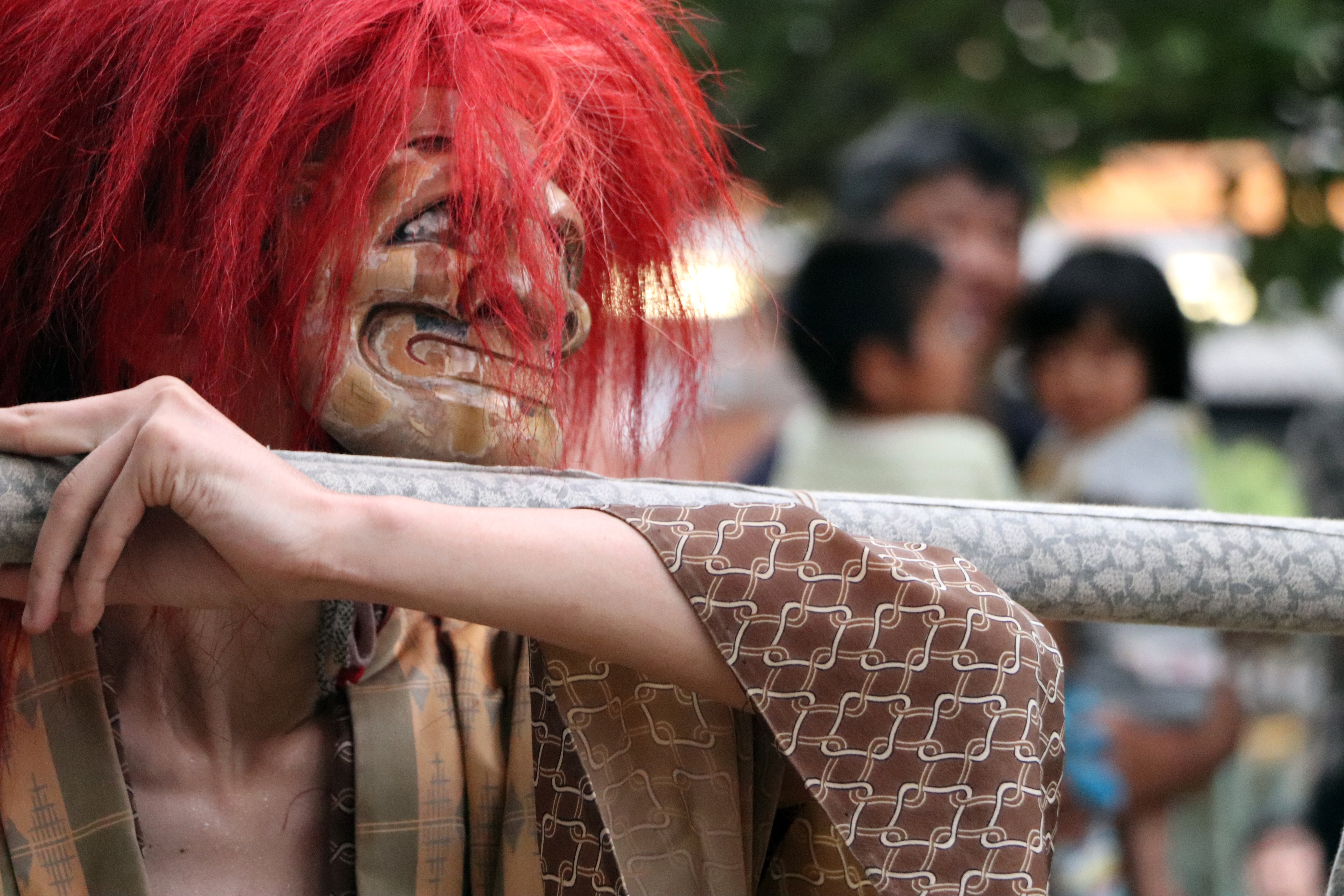 2018年8月16日椎出厳島神社